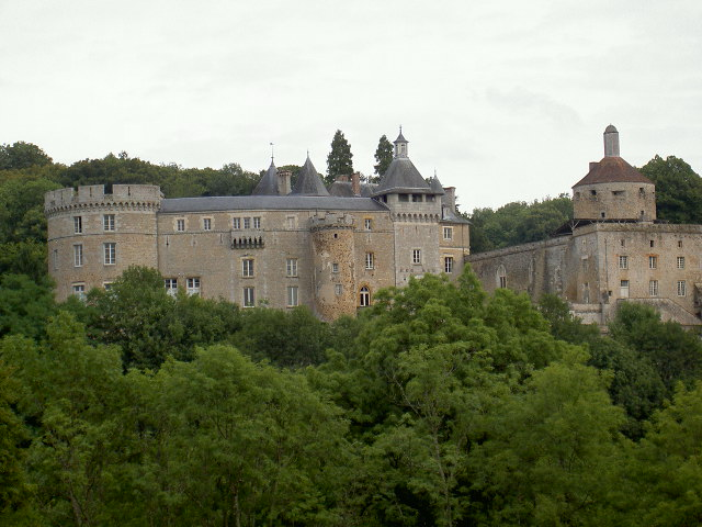 Chateau de Chastellux vue de l'ouest